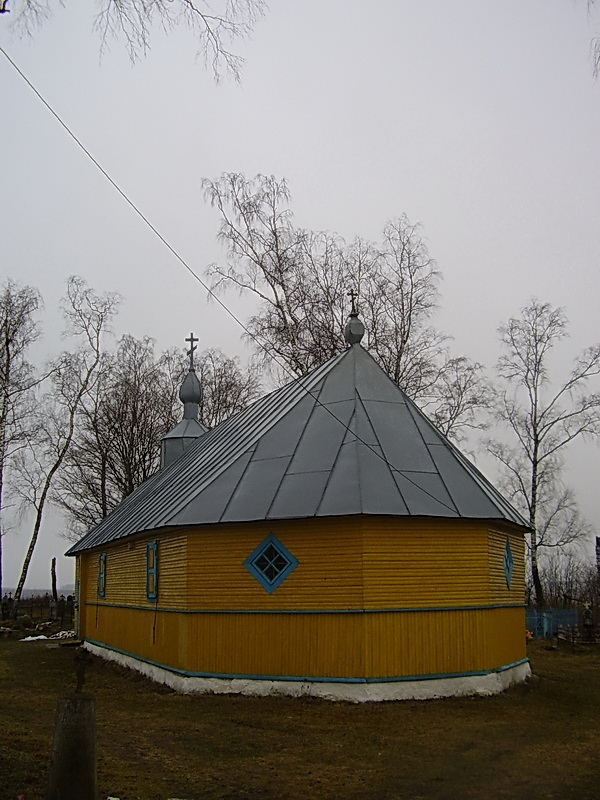 Лукі (Карэліцкі раён). Царква